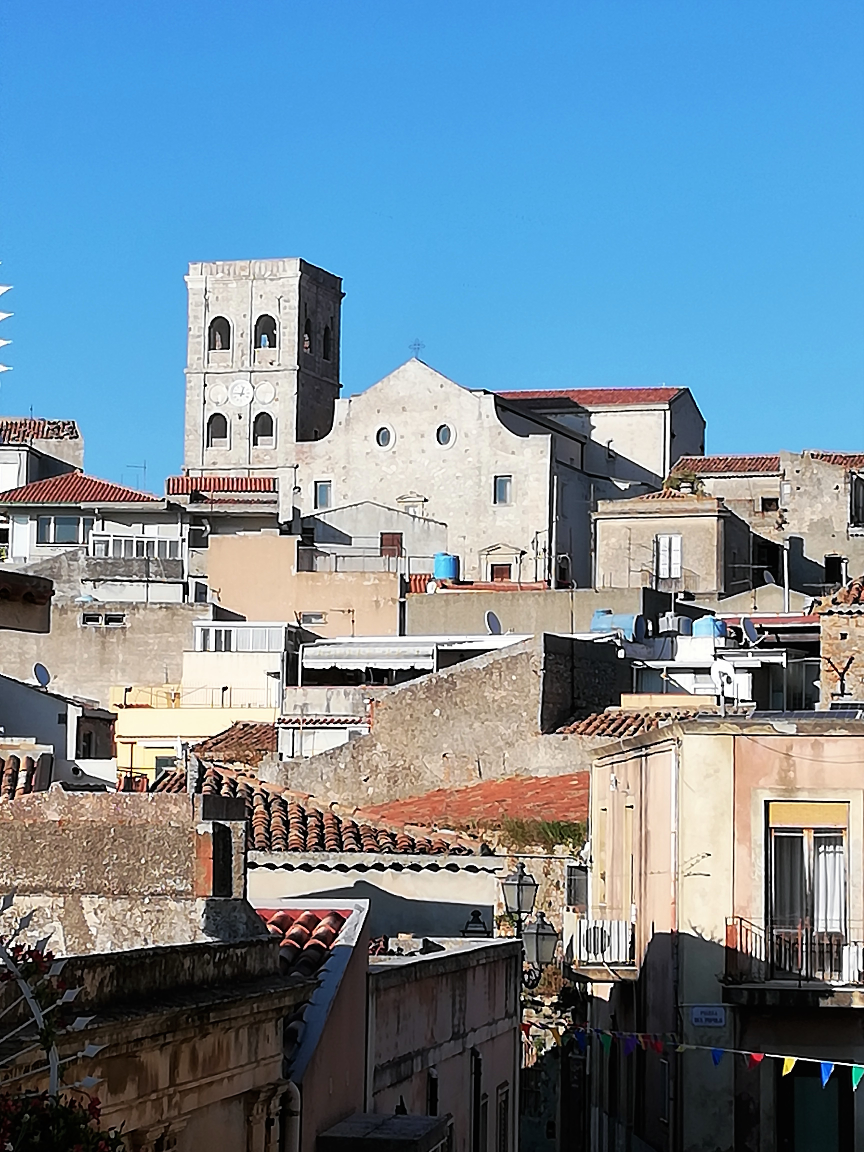 Il duomo di San Nicolò visto dalla Loggia del piano nobile.